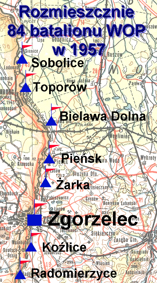 Rozmieszczenie 84 batalionu WOP w 1957